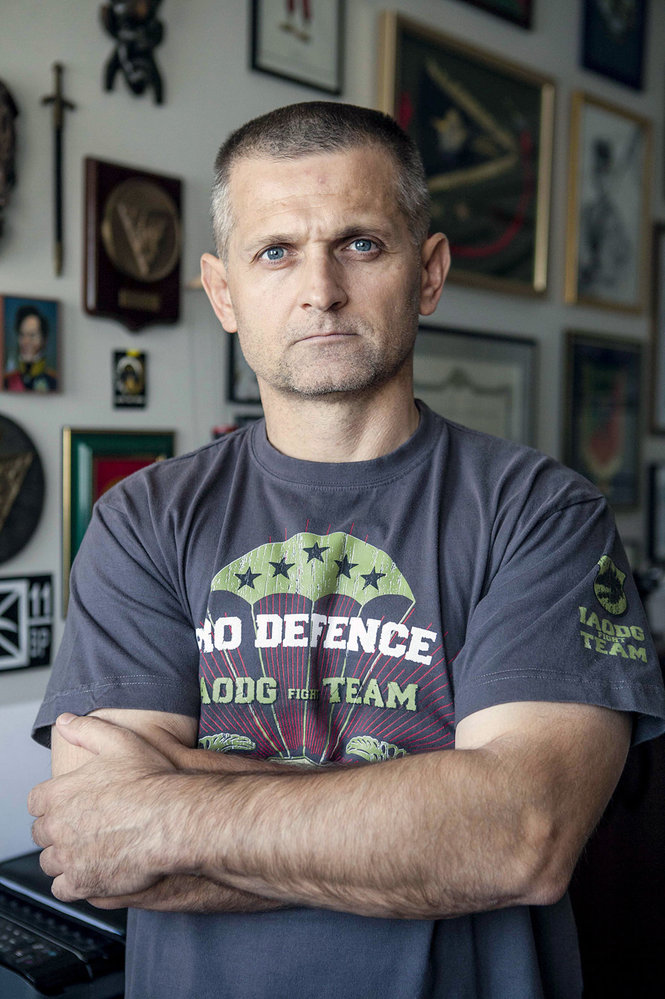 Stan Gazdik